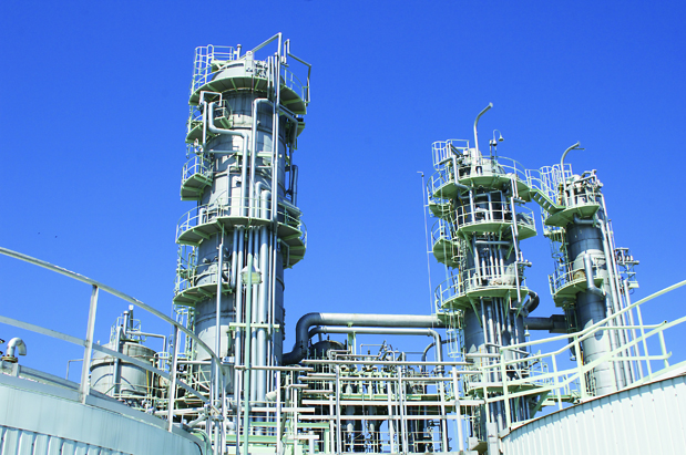 ハリマエムアイディ株式会社 トール油精留プラント (兵庫県加古川市)